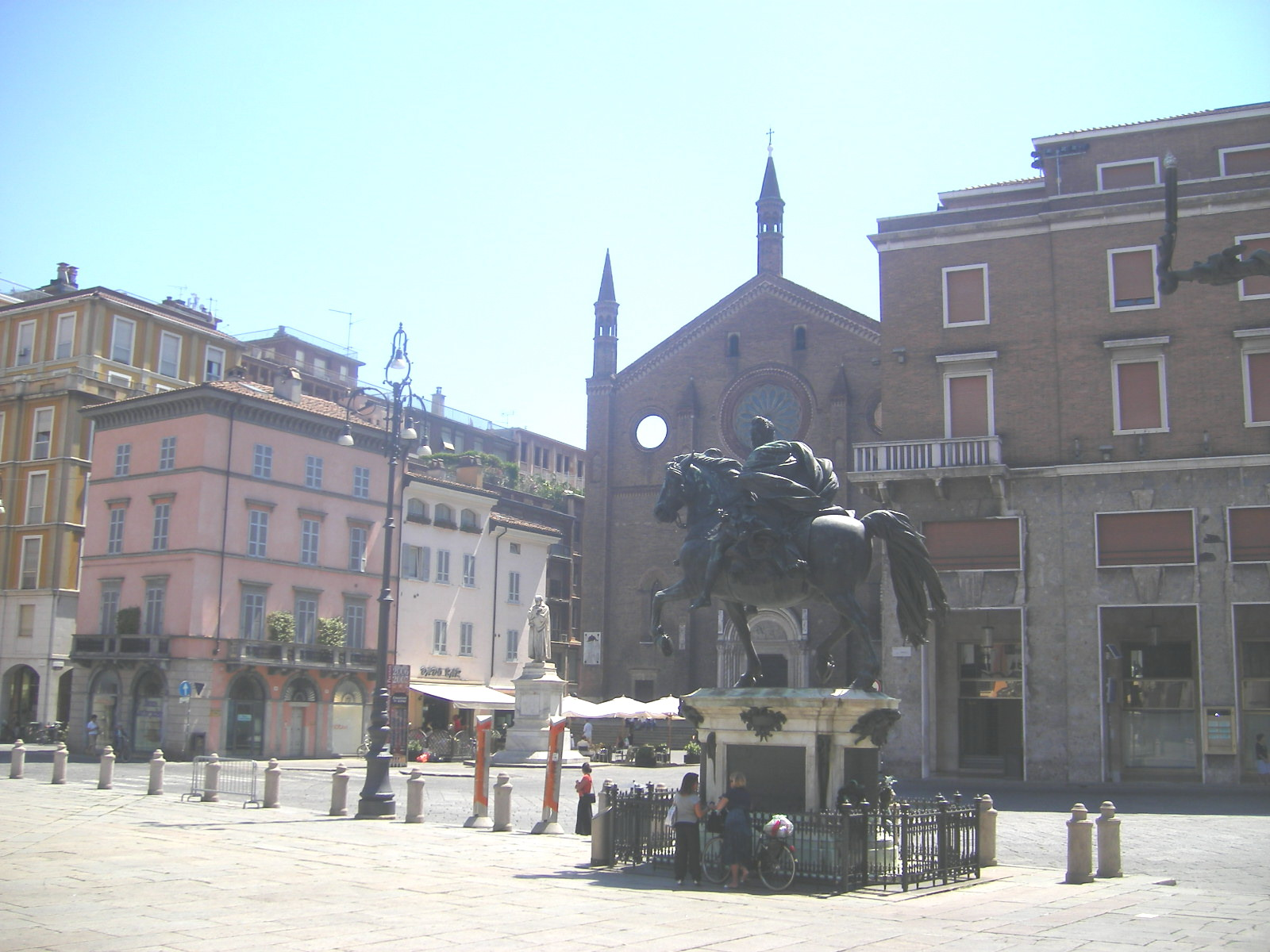 Piacenza